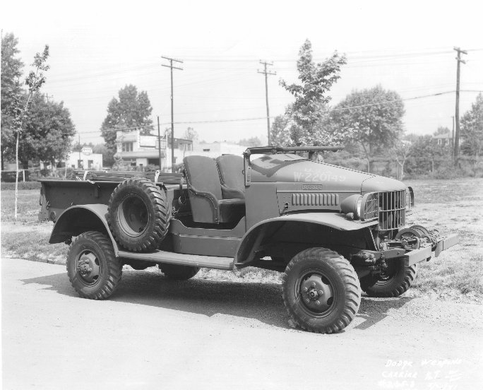 Dodge WC4 - Cabine ouverte + treuil the U.S Ordnance Department Administrative and Tactical Vehicles per QMC Contract.nr, 1940 through 1 January 1944 (Dodge T-207) identifies registration number 220149 as a T-207 with winch — meaning a WC-4.